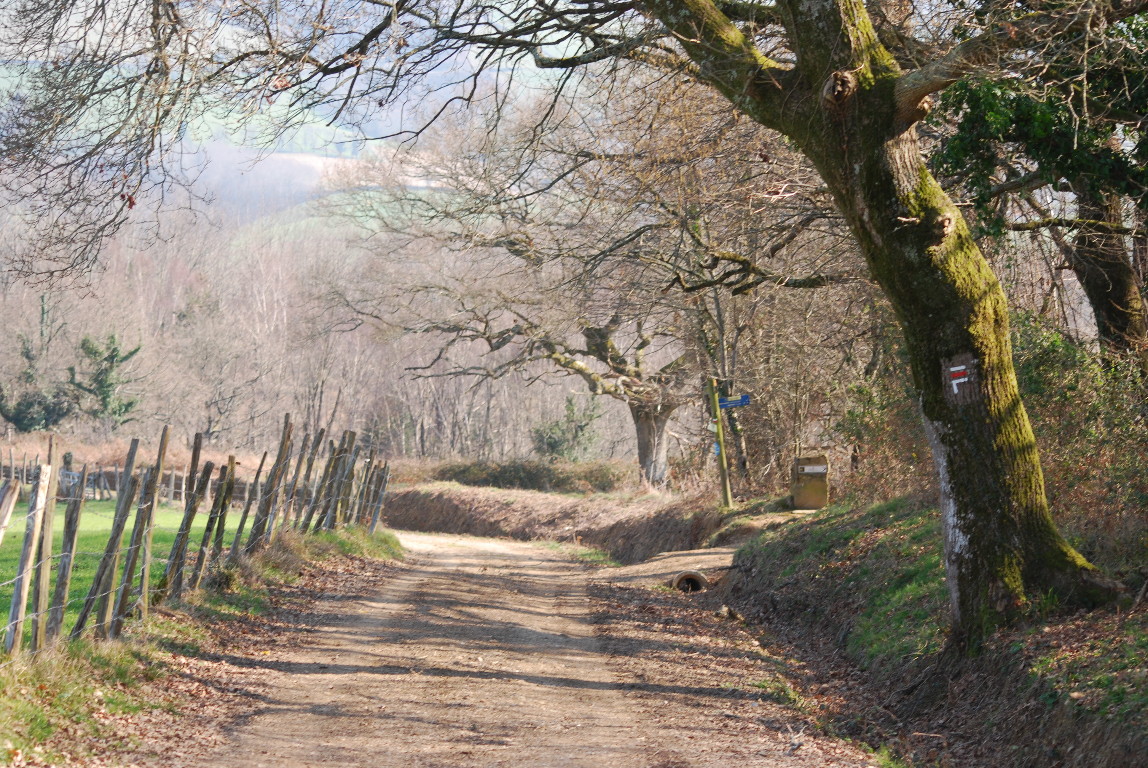 Le chemin de Compostelle (Via Podiensis) en descendant de Soyarza vers Harambeltz.